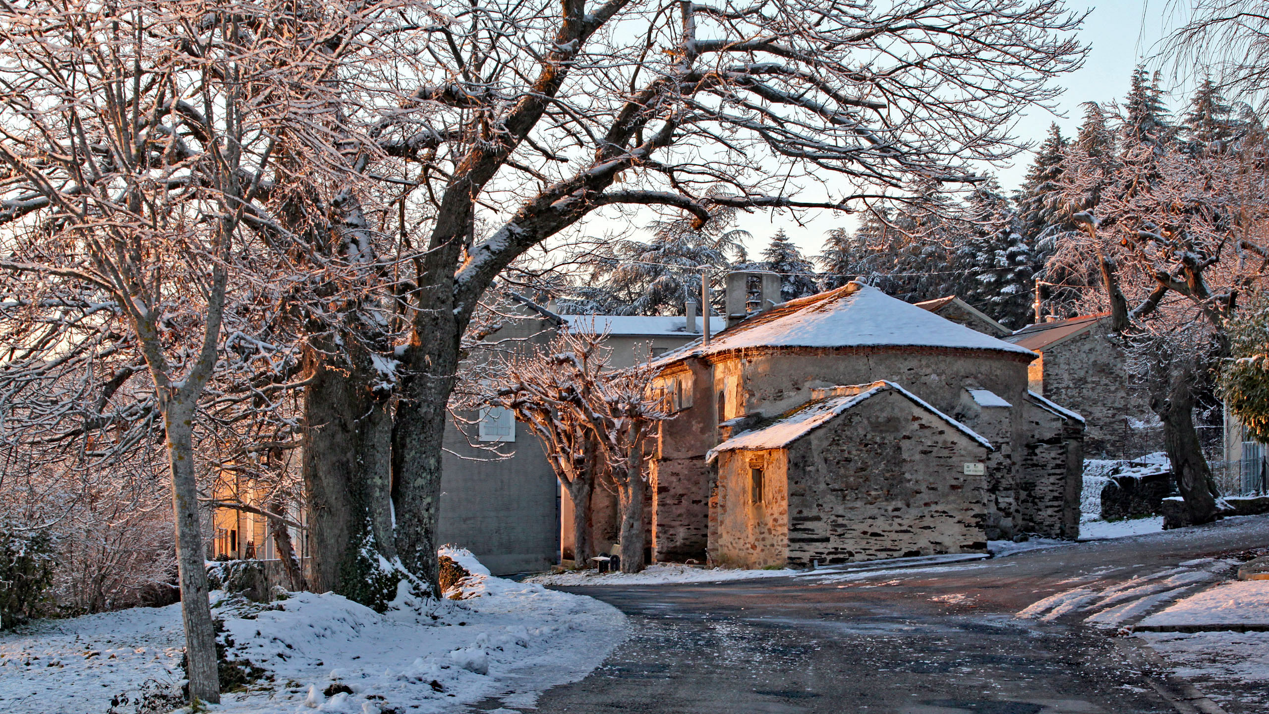 Eglise St Sébastien